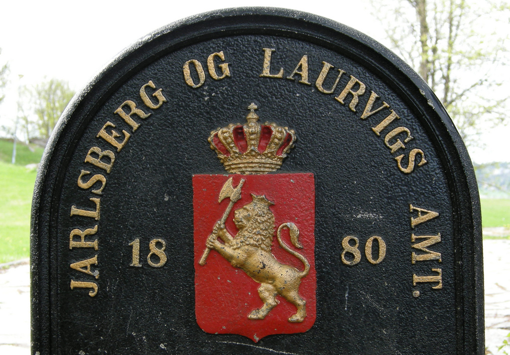 Jarlsberg og Laurvigs Amt - del av et vegskilt (avstand fra Kristiania)